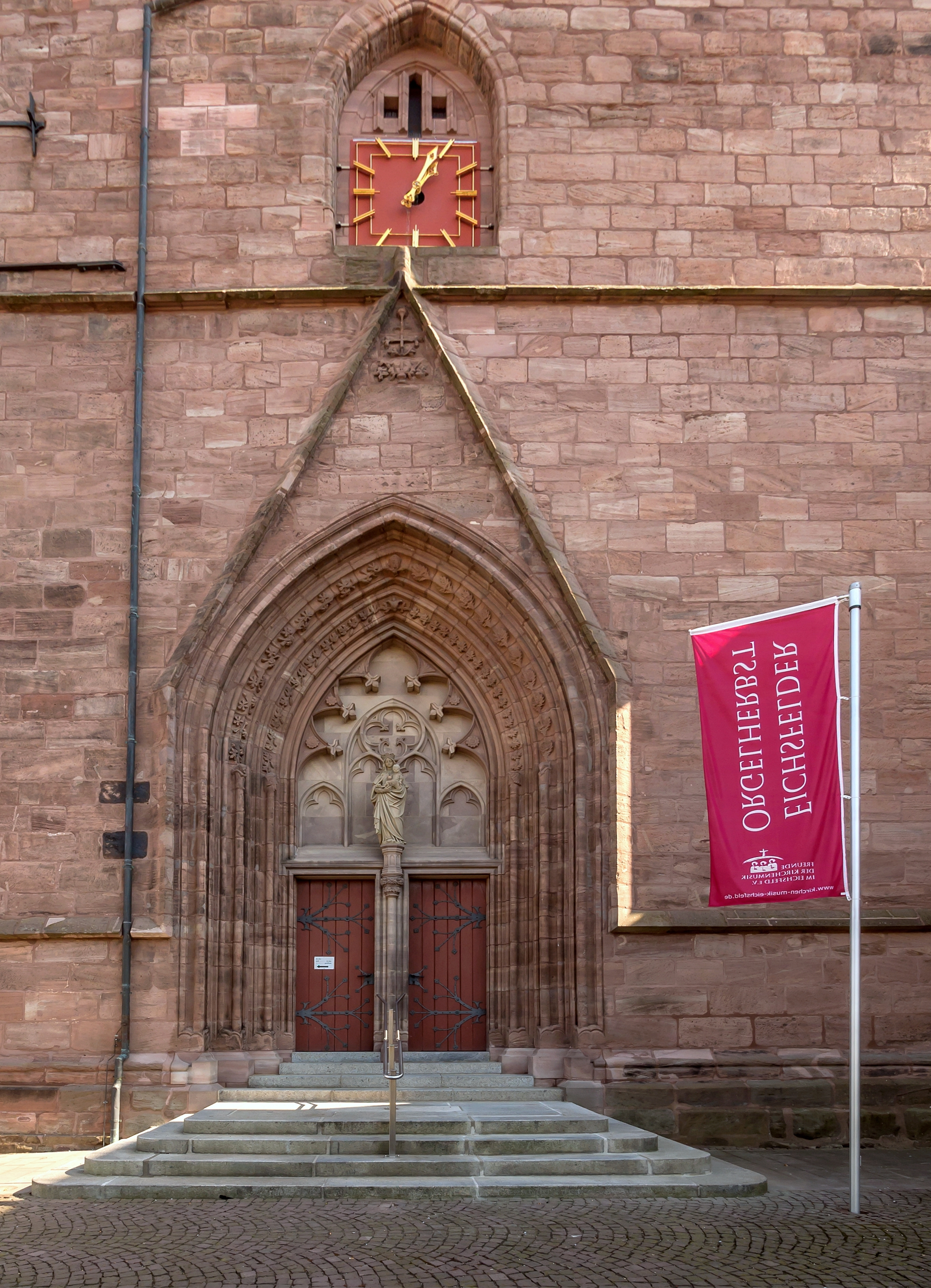 Heilbad Heiligenstadt Altstädter Kirchplatz 1 St. Marien Pfarrkirche (katholisch) Ausstattung Kirchhof Treppenanlage 11